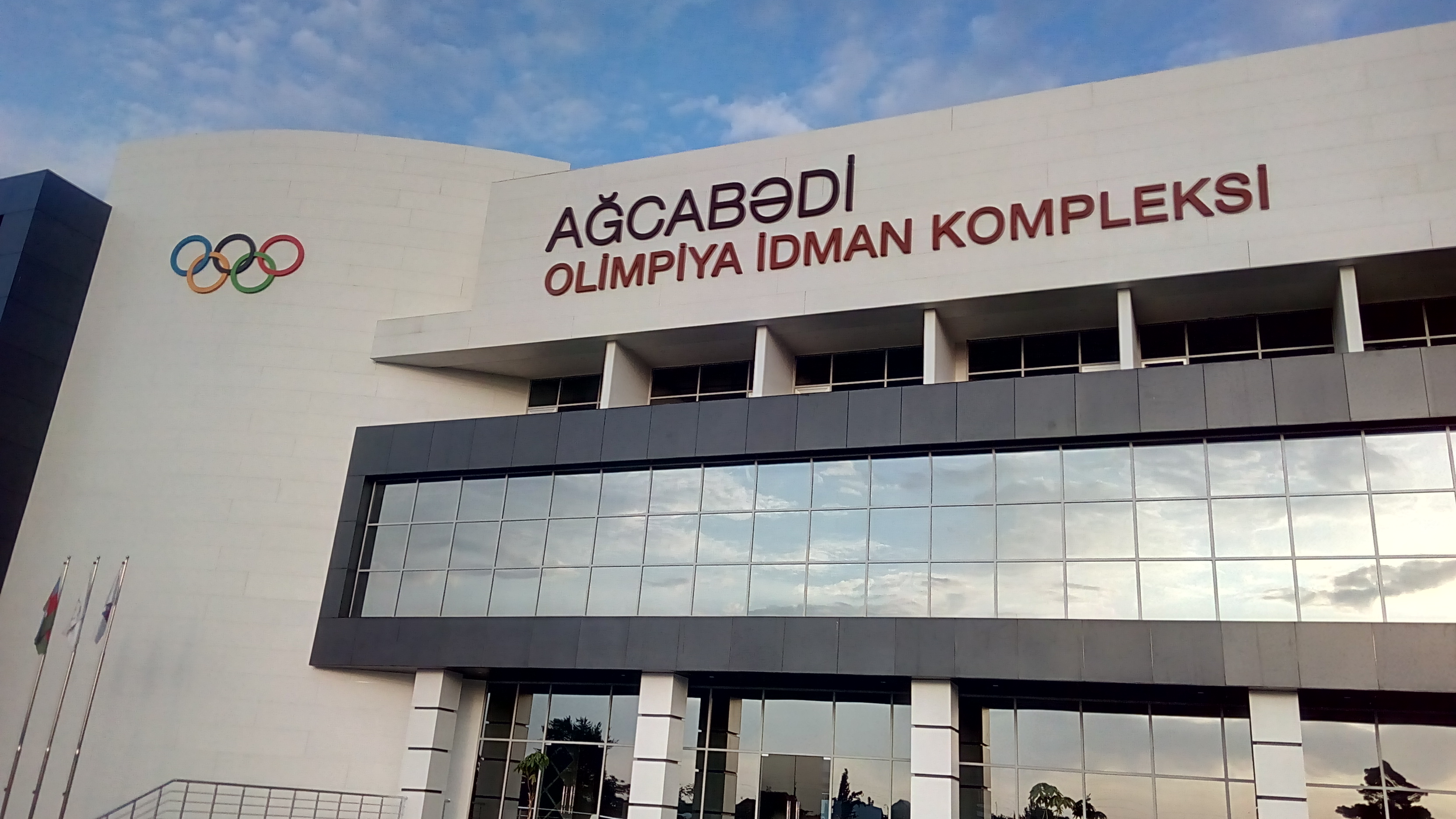 Ağcabədi OİK